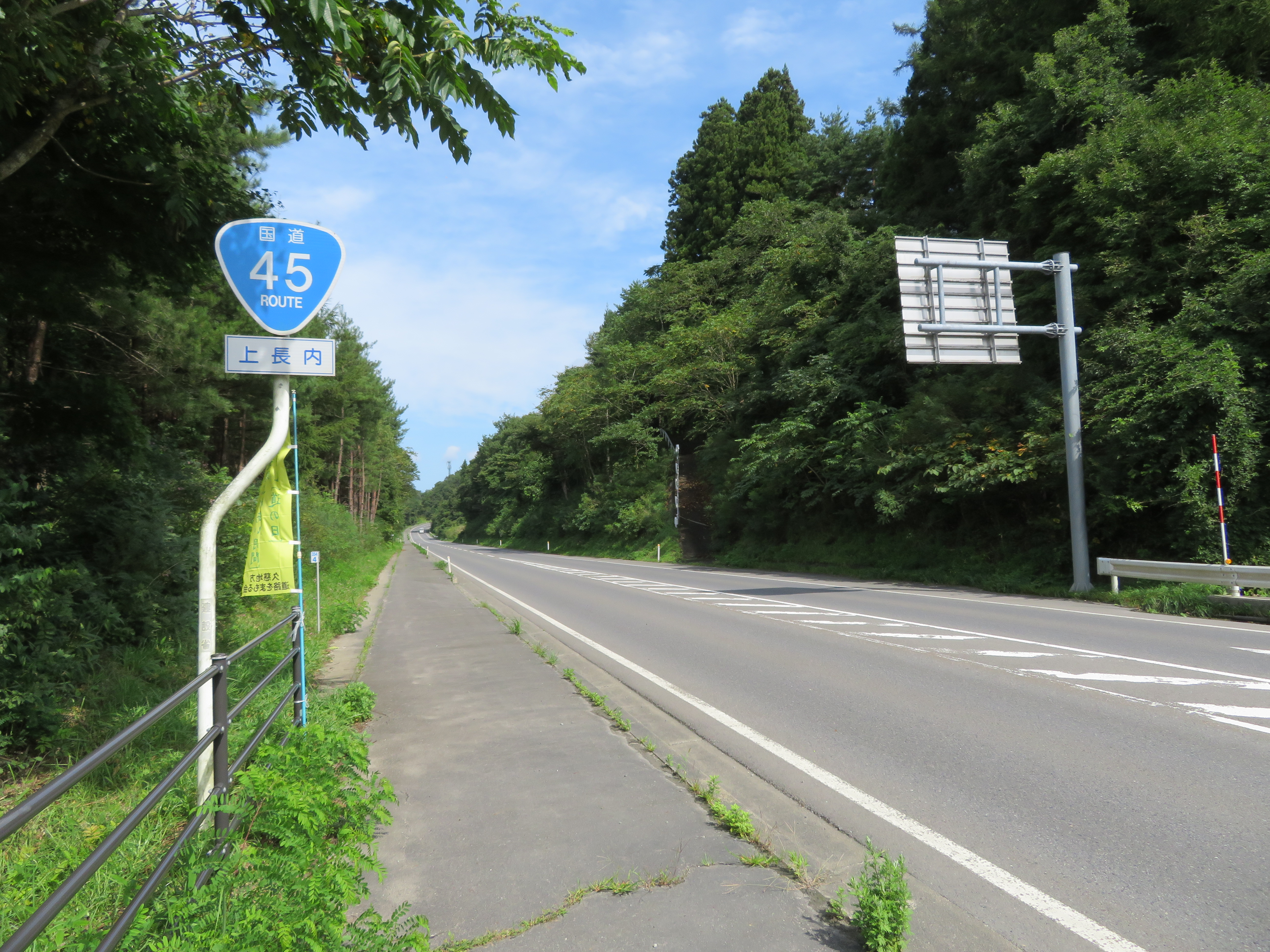 国道45号線久慈バイパス岩手県久慈市上長内付近（久慈大橋方面を撮影） Canon PowerShot SX720 HS